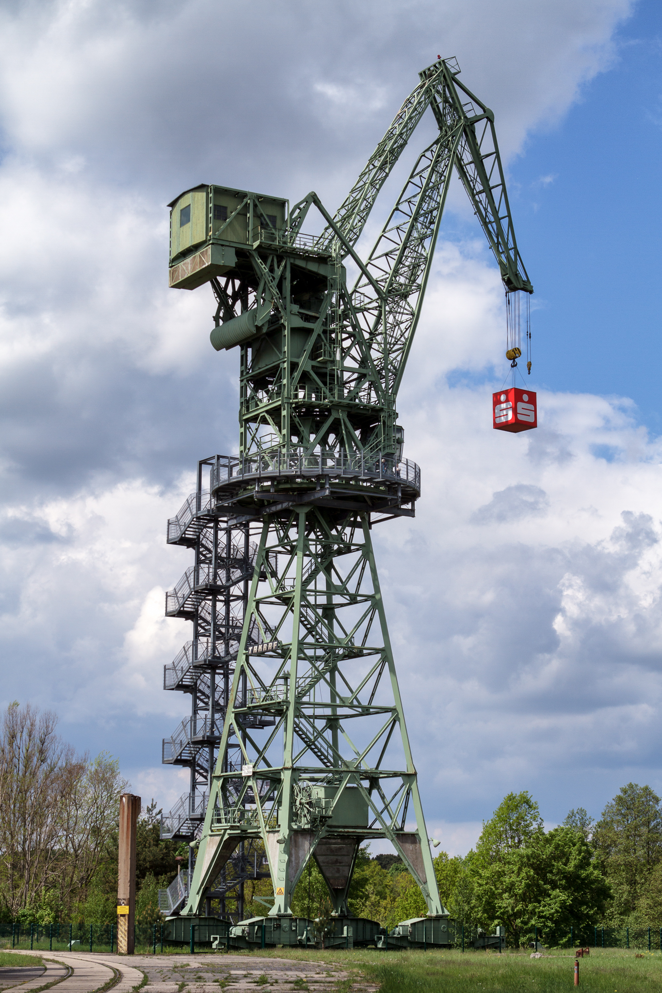 Montageeber - Eberswalde - 2013